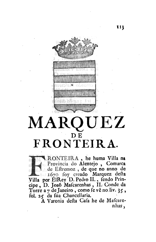 Página 113 das "Memorias Historicas e Genealogicas dos Grandes de Portugal", 3.a edição ― Título de Marquês de Fronteira